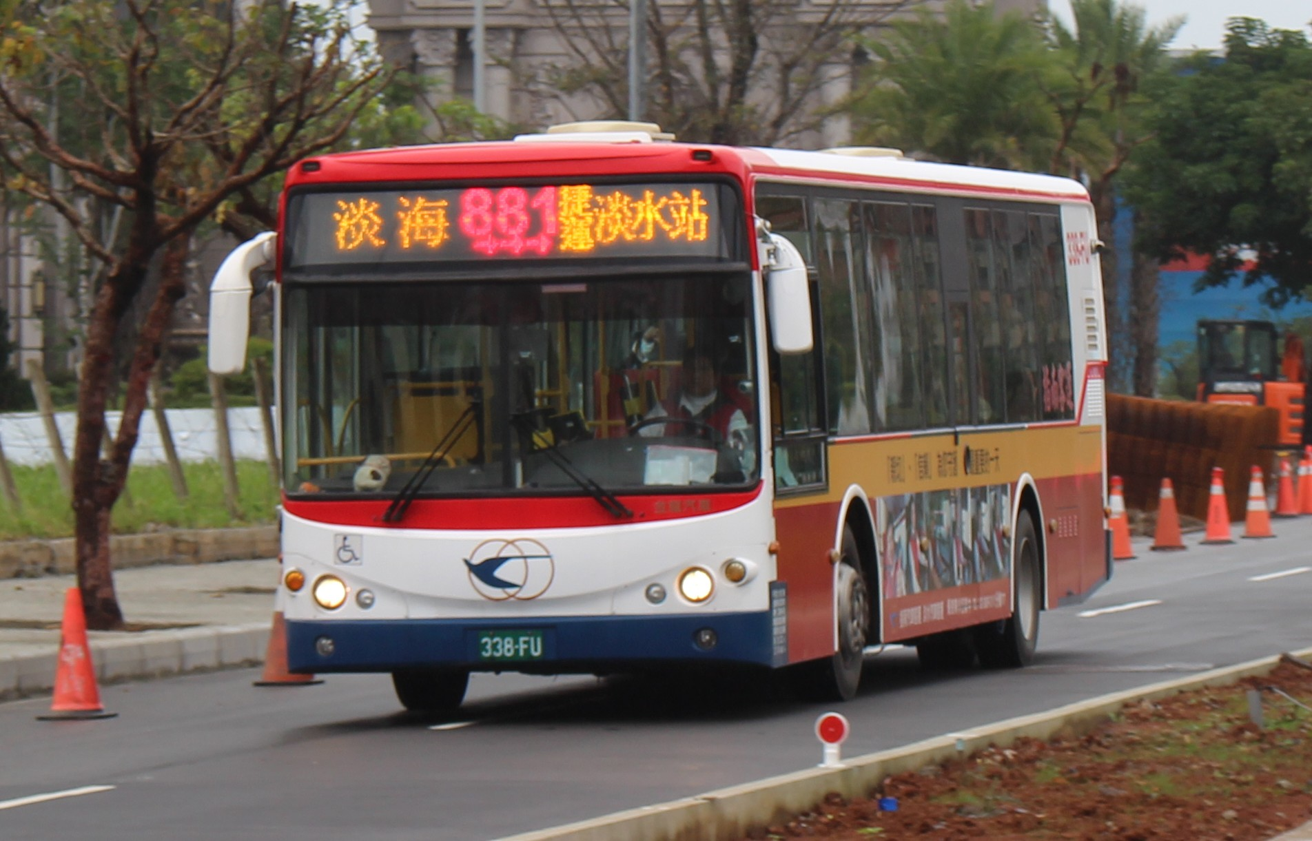 指南客運 2010 KINGLONG KL6112U1 338-FU 881